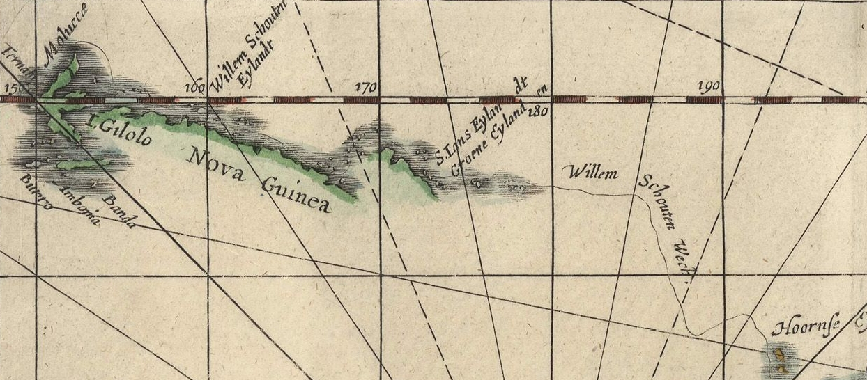 Caarte vande Zuijdzee vertonende wat wech Willem Schouten door de zelve gezeijlt en wat landen en eijlanden bij hem aldaer gevonden zijn. Kaart van de route die Le Maire en Schouten volgden vanaf Patagonie tot Ternate.